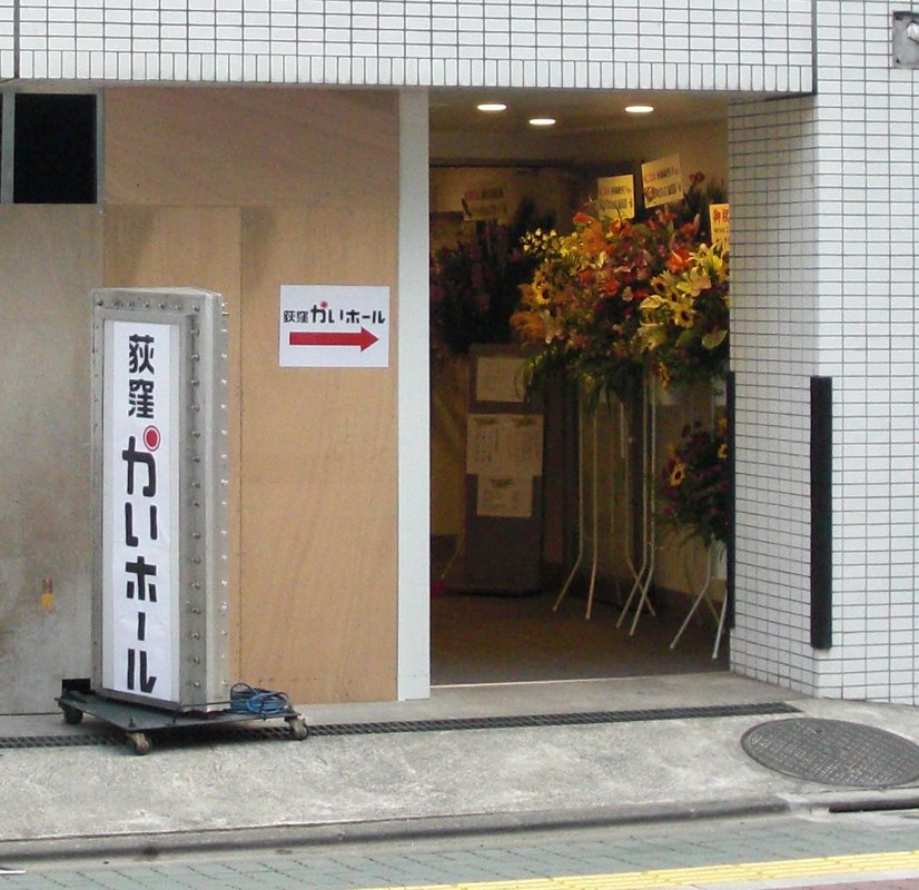 Ogikubo kai hall (Suginami, Tokyo, Japan)